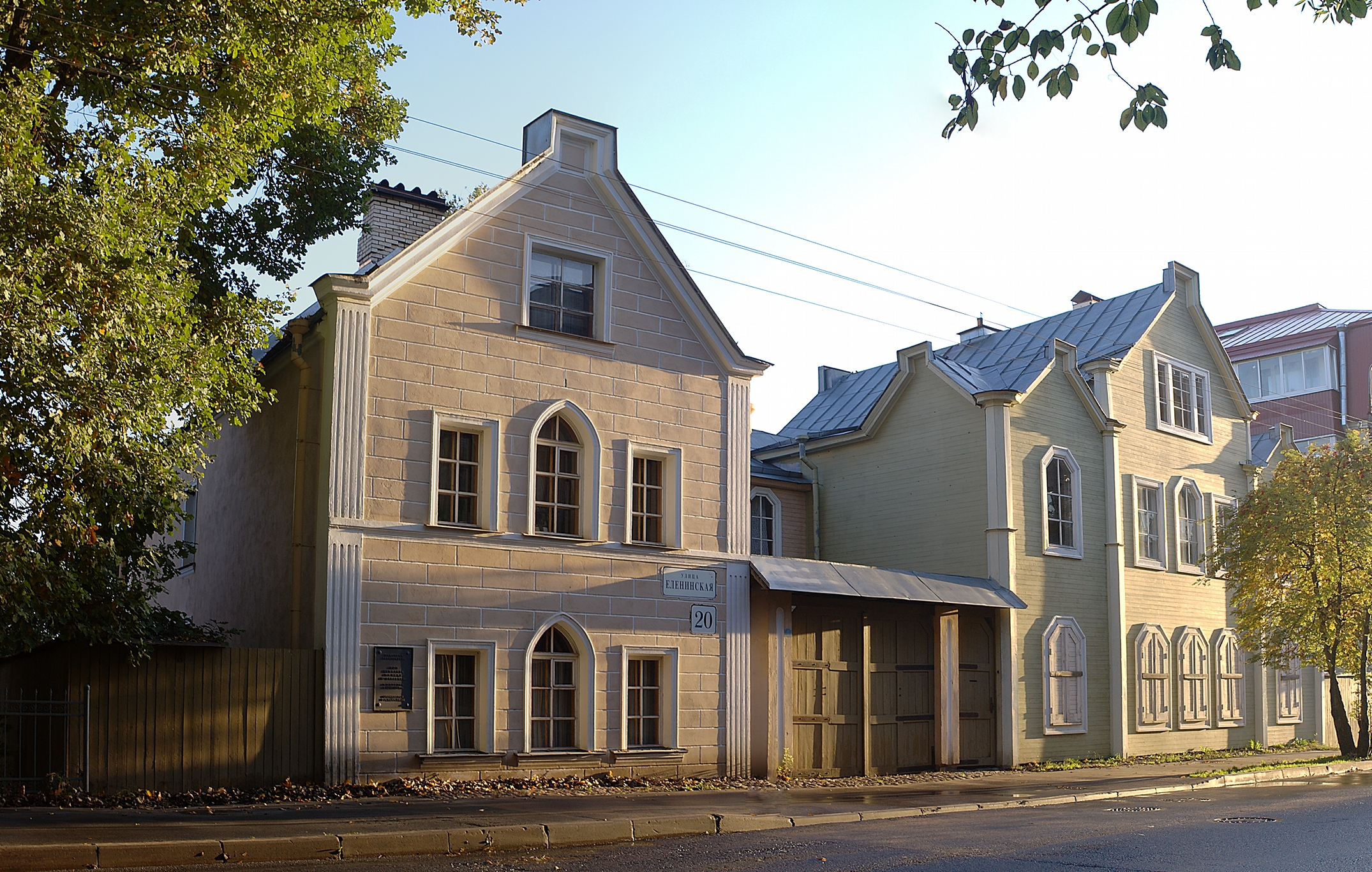 Усадьба контр-адмирала анжу /с территорией/ (Санкт-Петербург и Лен.область, Ломоносов, ленинская улица, 20, 22)